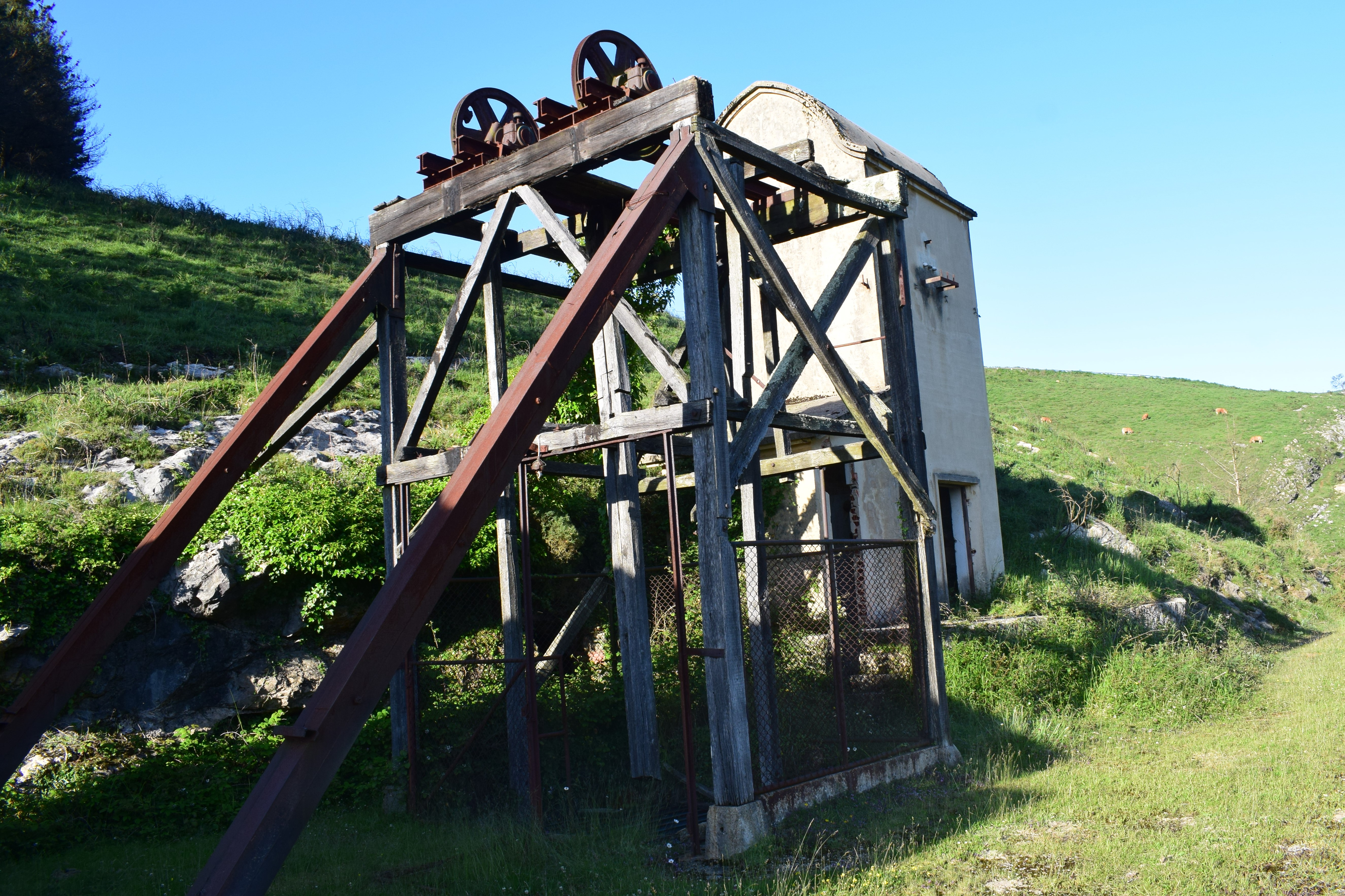 Castillete de la mina Lacuerre (grupo minero de La Florida), entre los municipios españoles de Herrerías y Rionansa (Cantabria), cerca de la cueva de El Soplao.